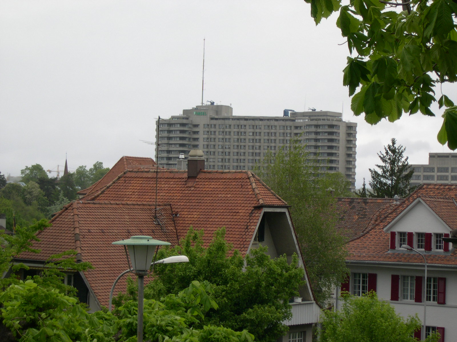 Das Bettenhochhaus des Inselspitals in Bern, fotogafiert vor der Friedenskirche von Benutzer:Supermutz am 14.5.2005, 16:40